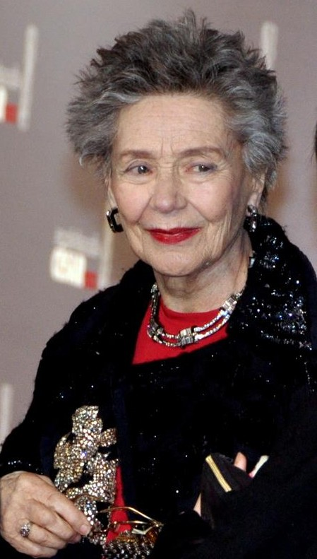 Emmanuelle Riva à la cérémonie des César